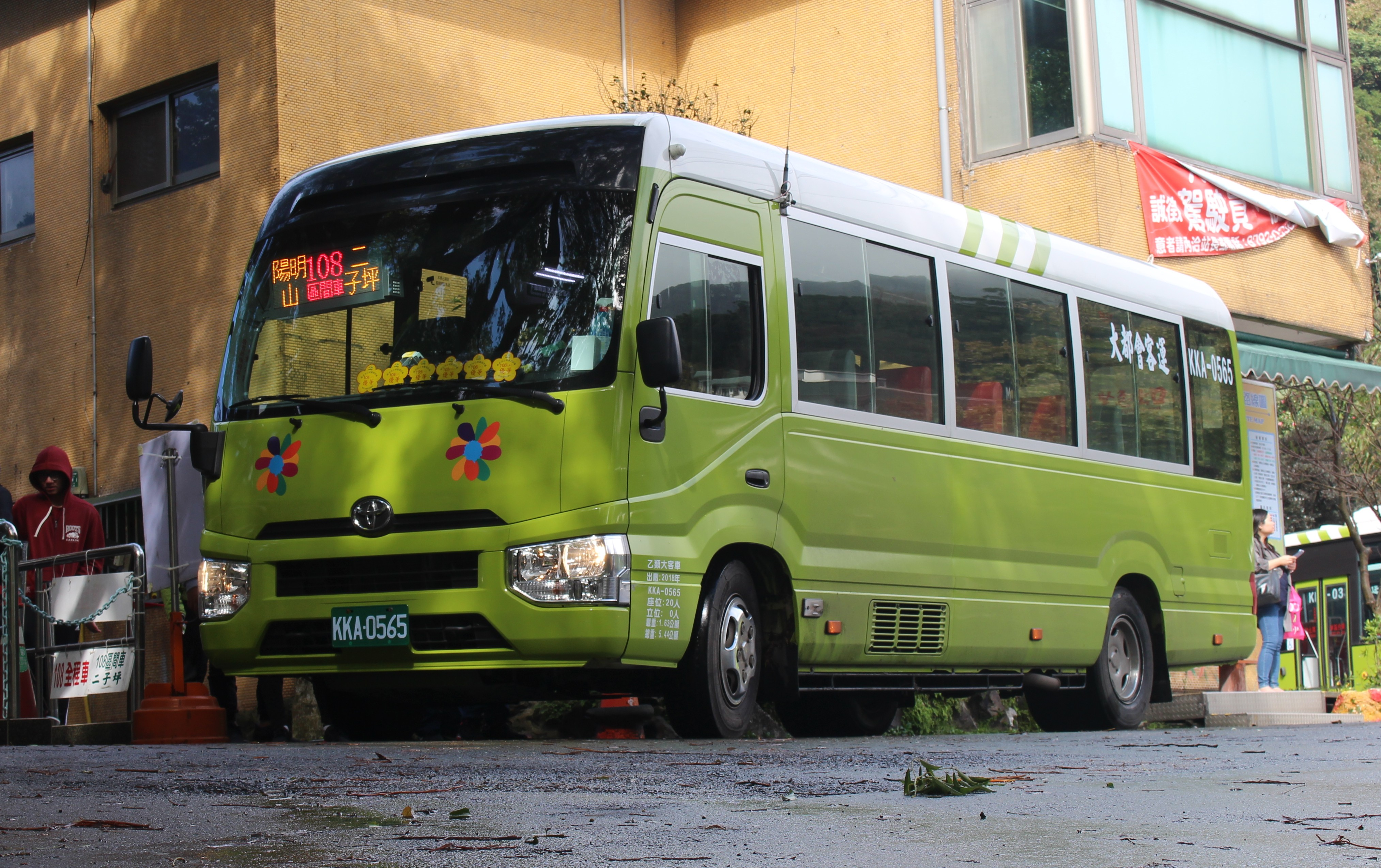 大都會客運 2018 TOYOTA COASTER XZB70L-ZEMSYR KKA-0565 108區間車